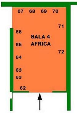 Distribución de las obras en la sala número 4 del Museo Ulpiano Checa